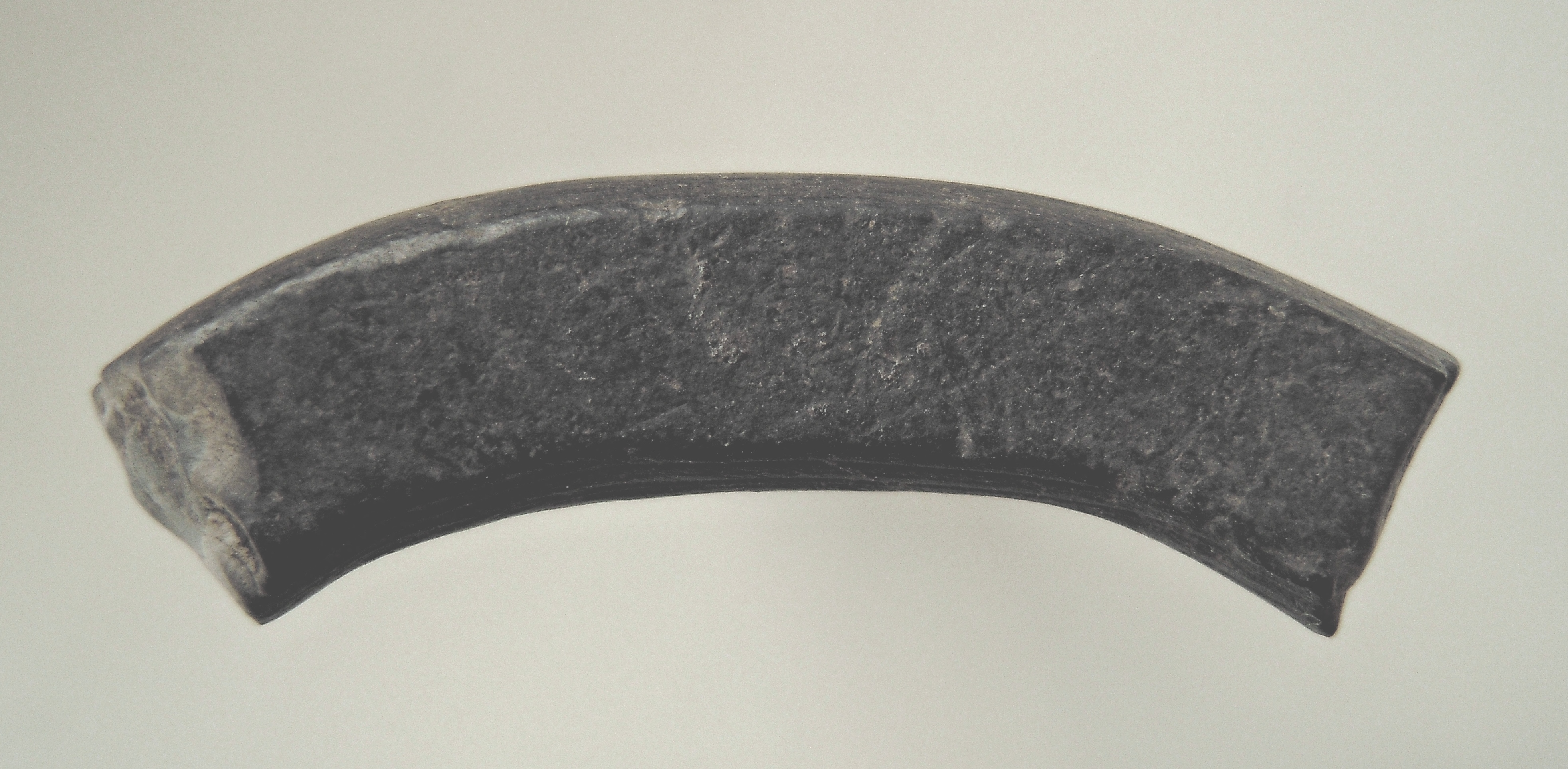 Фрагмент сланцевого браслета. Поселение Ясеновая Поляна, Адыгея.